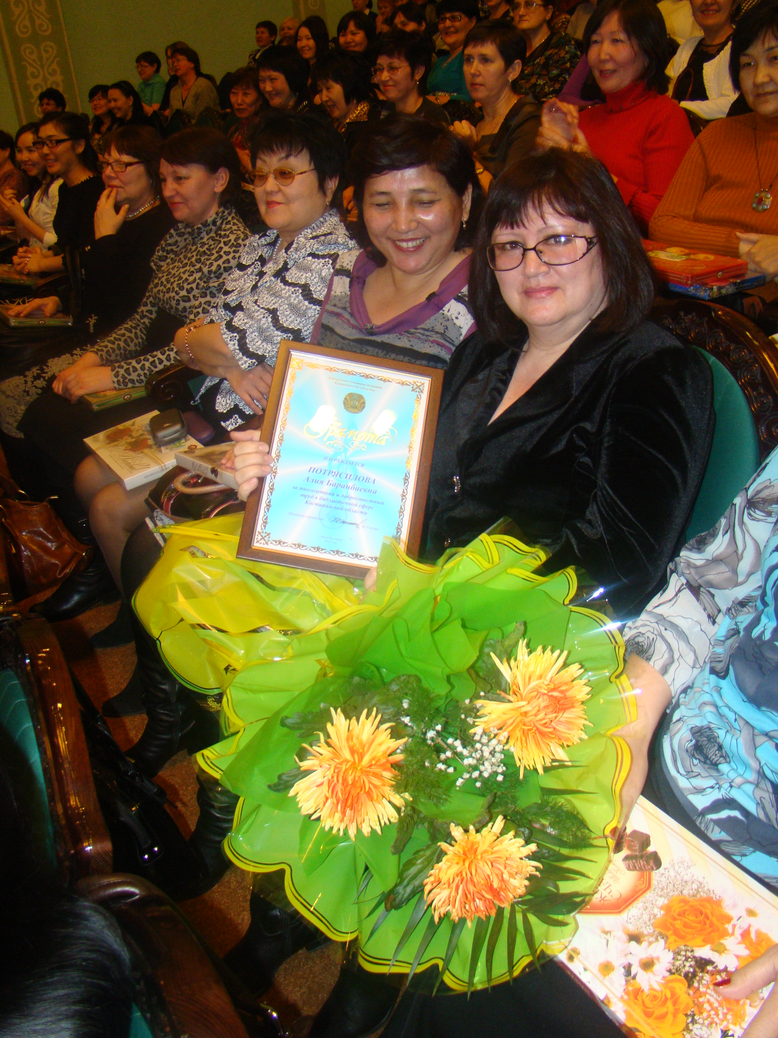 Потрясилова А. Б.